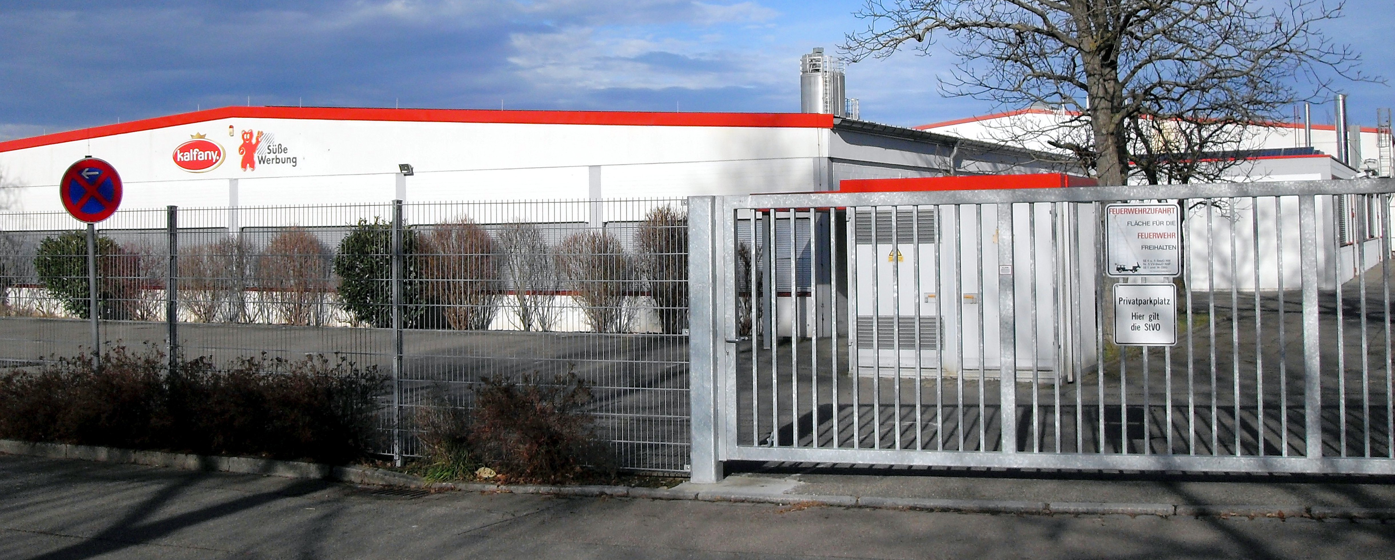 Kalfany Süße Werbung, Produktionsstandort der Pulmoll Husten- und Halsbonbons in Müllheim